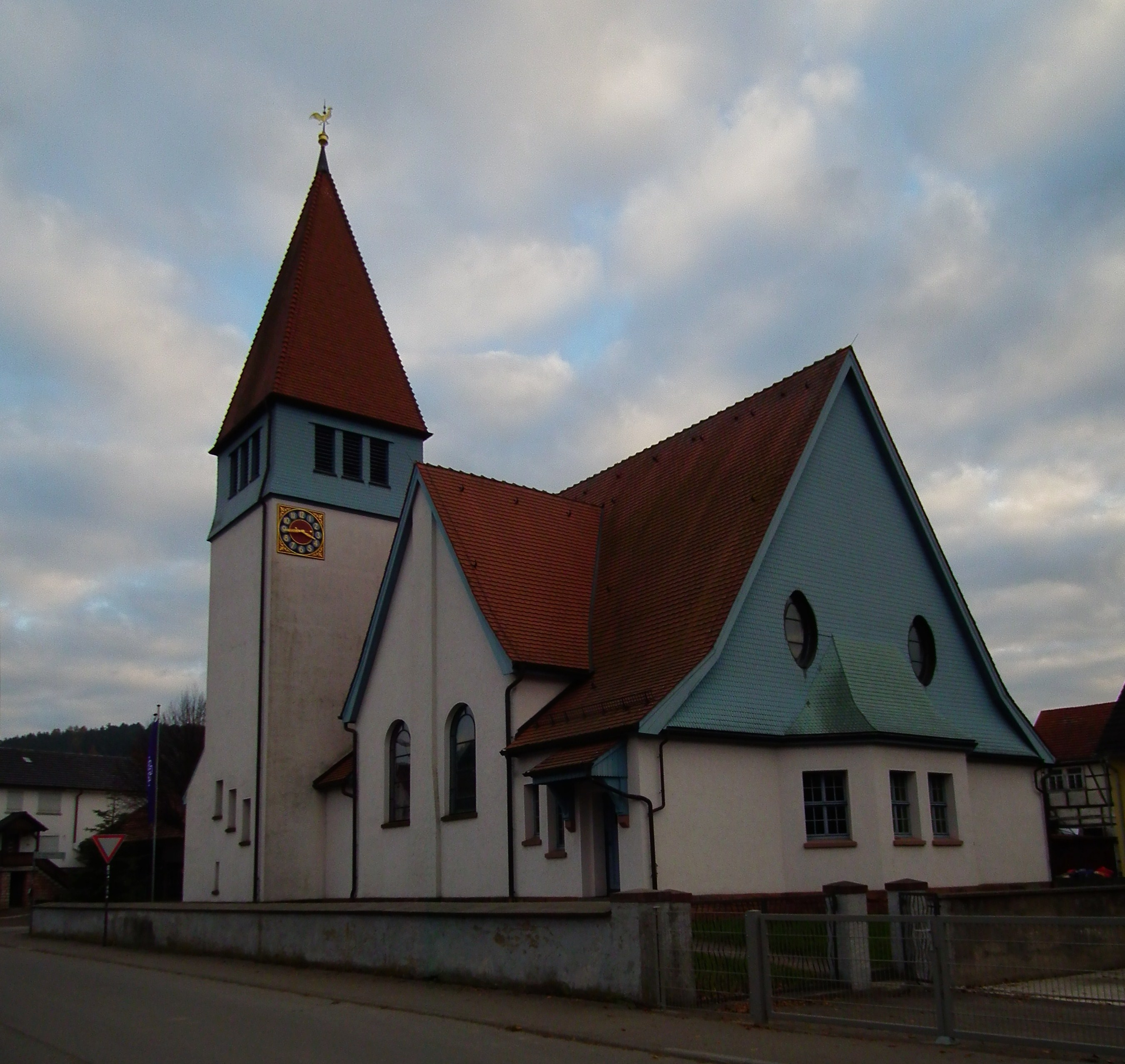 Gustav-Adolf-Kirche in Affolterbach, einem Ortsteil von Wald-Michelbach (Kreis Bergstraße, Hessen, Deutschland)